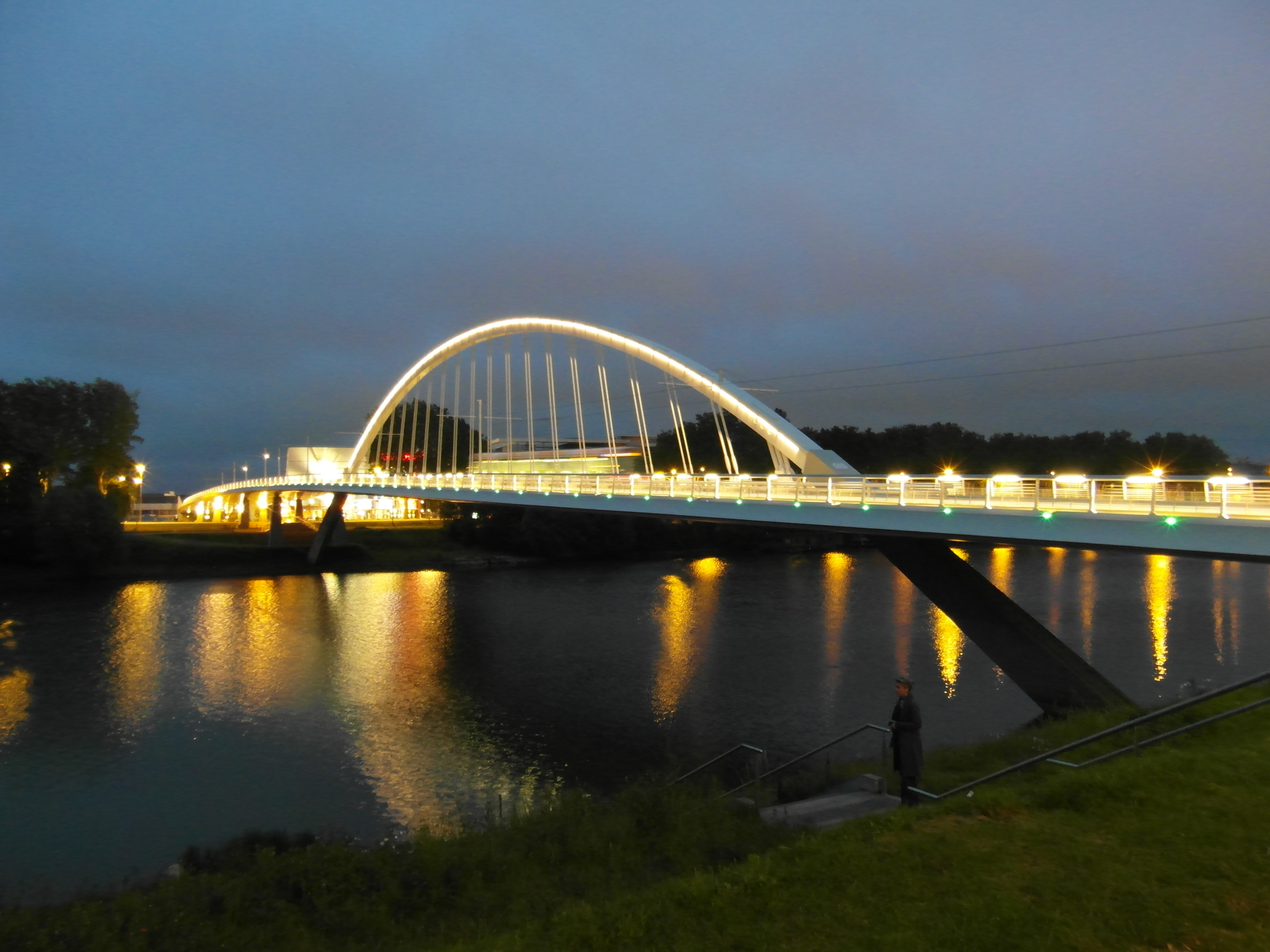 Pont du tramway - Eine Straßenbahnbrücke